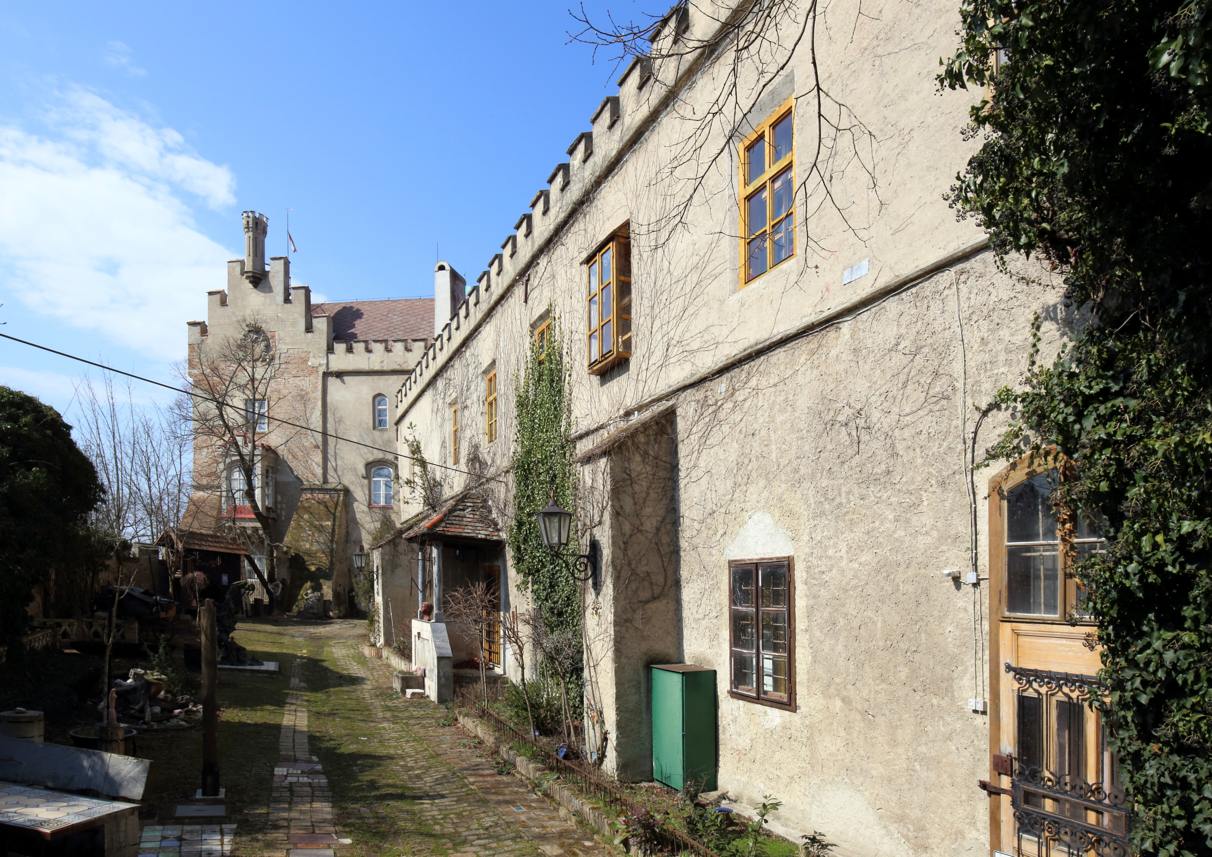 Fassade des Südosttraktes und östliche Stirnseite des Hauttraktes des Schlosses in Matzen;, ein Ortsteil der niederösterreichischen Marktgemeinde Matzen-Raggendorf. Eine mächtige weithin sichtbare Anlage, die urkundlich 1194 und 1424 erwähnt wird. Der Bestand stammt weitgehen aus dem 17. Jahrhundert, wobei Graf Kinsky im Jahr 1827 eine romantische Umgestaltung vornahm.